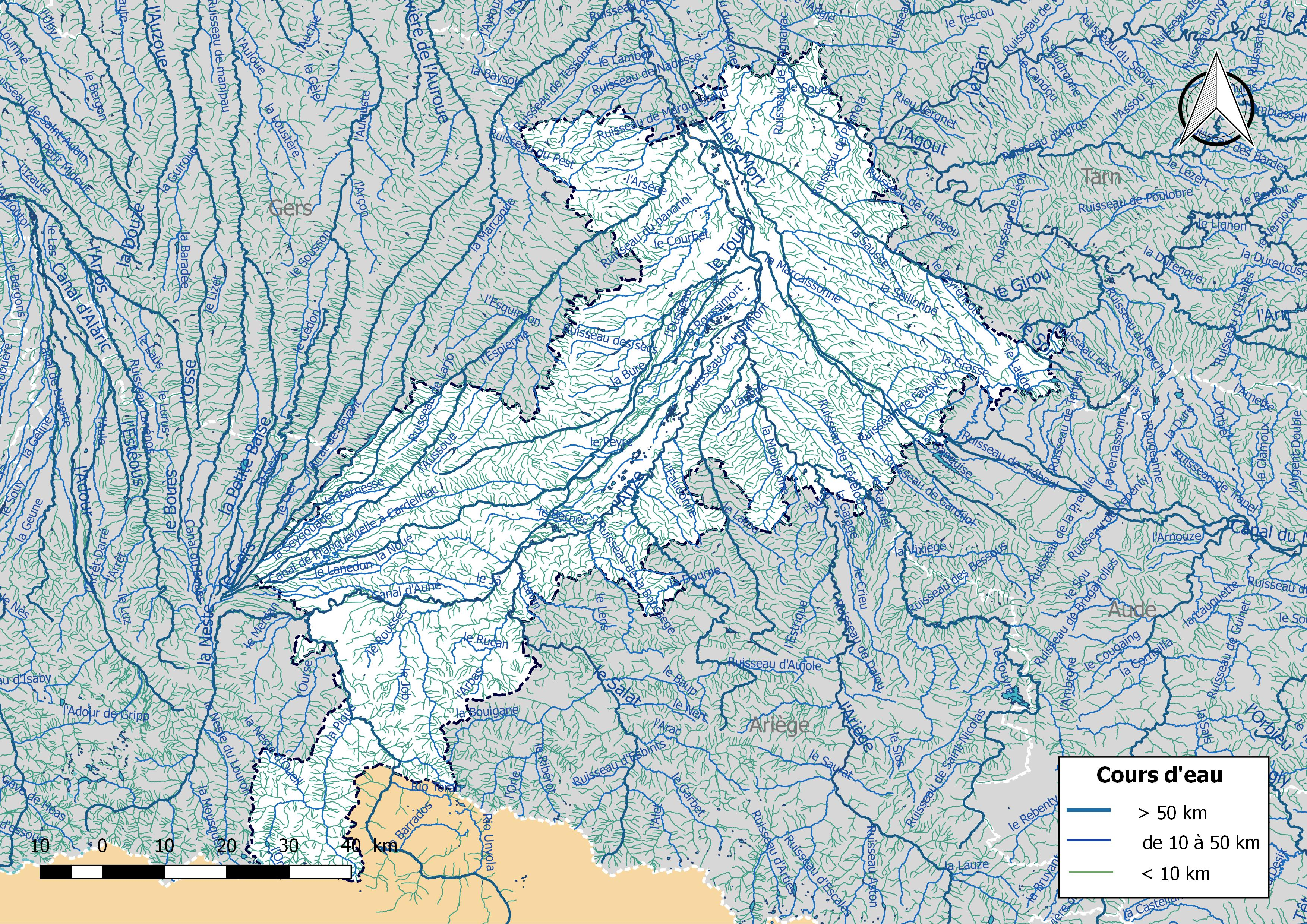 Réseau hydrographique du département de la Haute-Garonne (France).